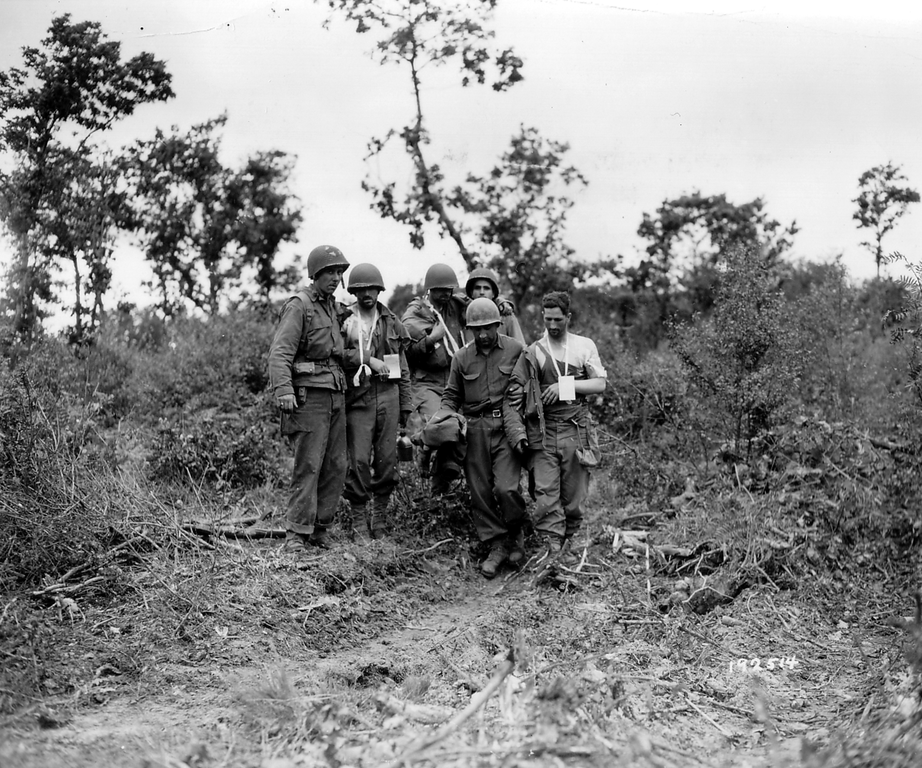 Bataille de normandie opération la Guerre des haies. Ces soldats en périphérie de l'Haye du Puits dans la zone de bocage redescendent leurs blessés.